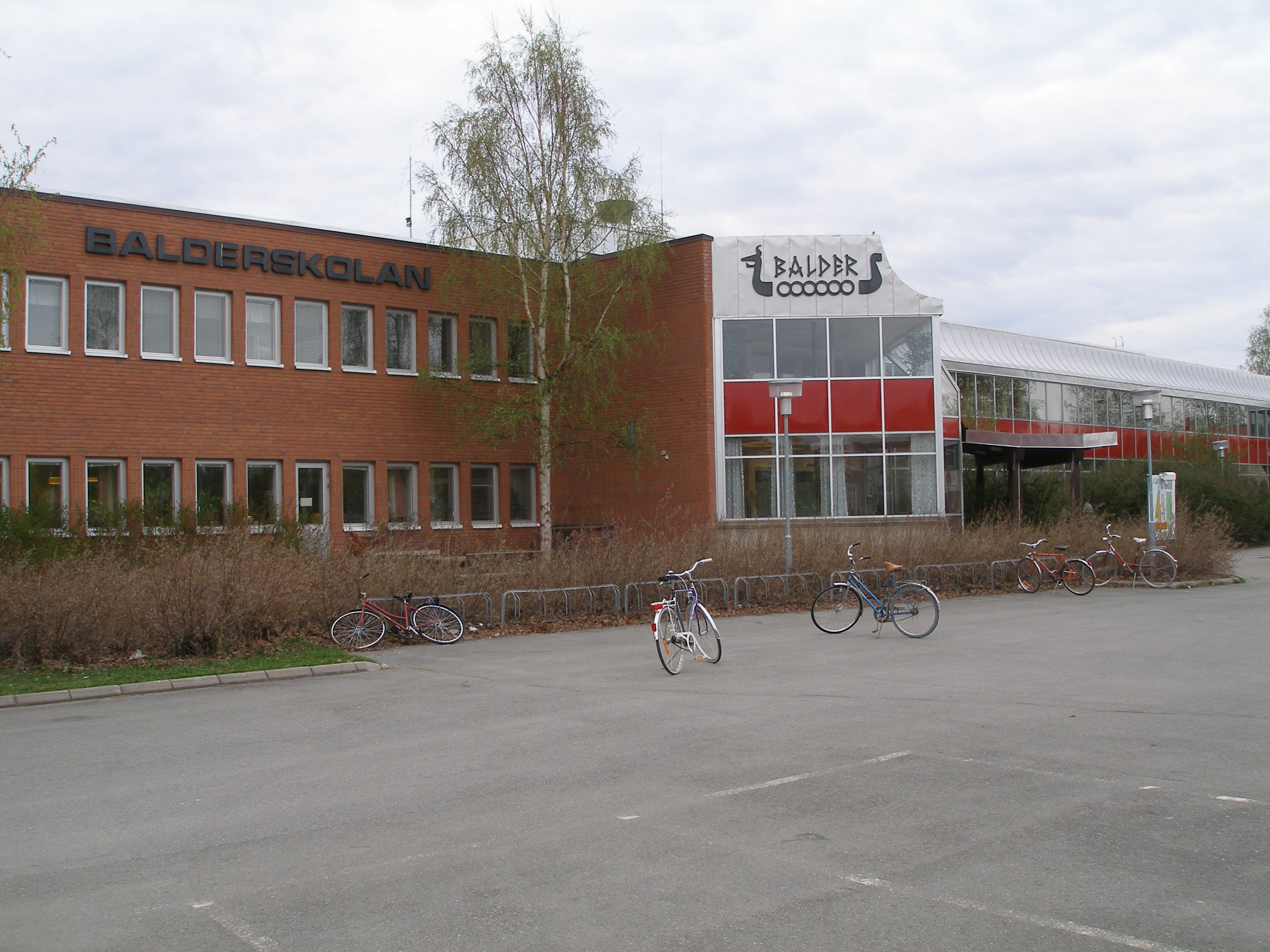 Balderskolan i Skellefteå. Västra entrén.